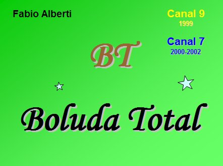 Infografía sobre "Boluda Total" de Fabio Alberti.